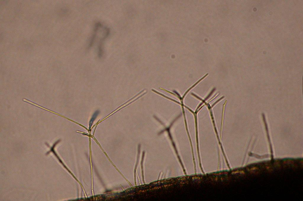 Tetrachaetum elegans 水生不完全菌 2003.11.13：和歌山県すさみ町 水中落葉を室内で培養したものから